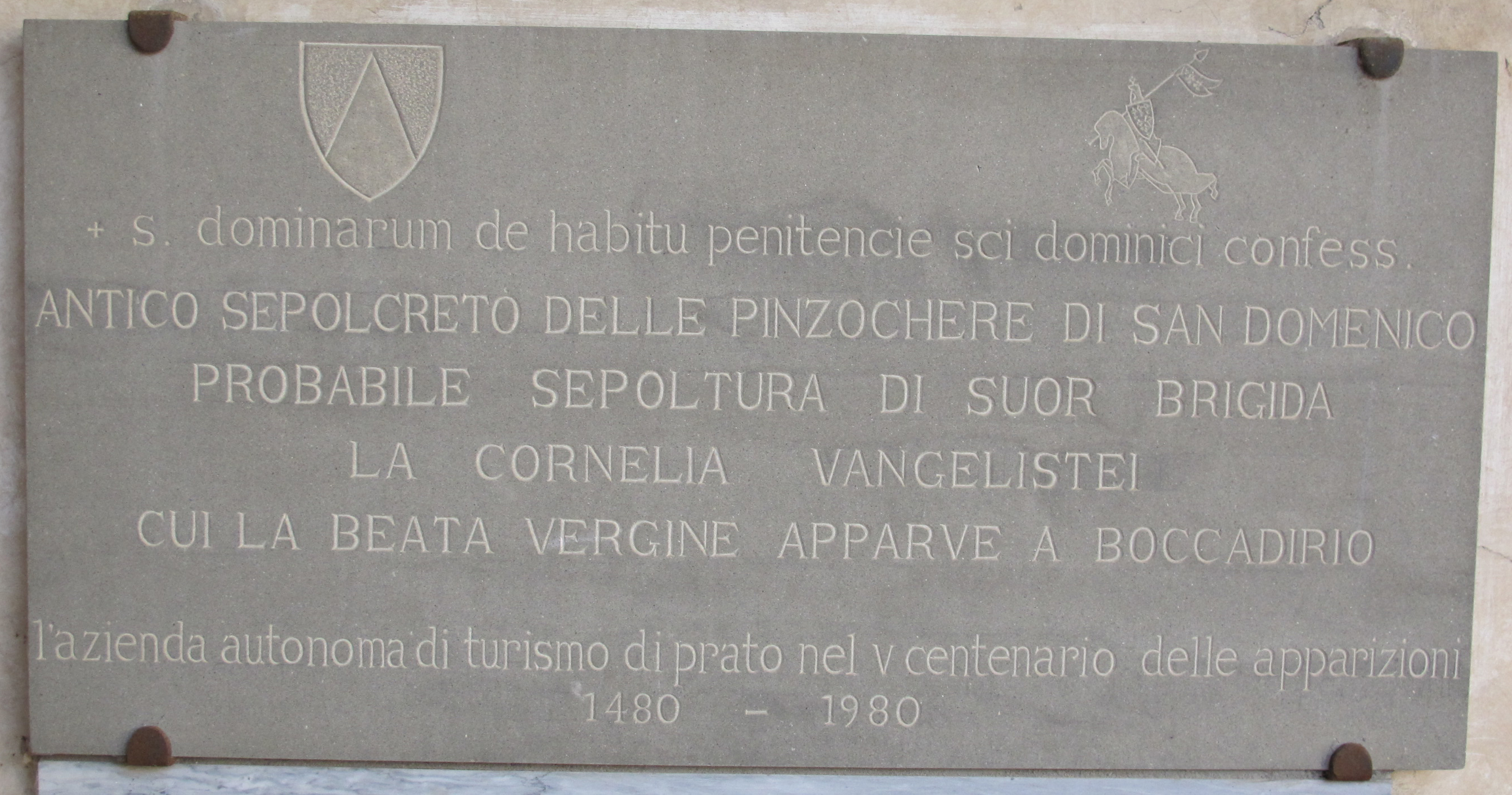 Chiostro di s. domenico, po, ricordo suor brigida di boccadirio